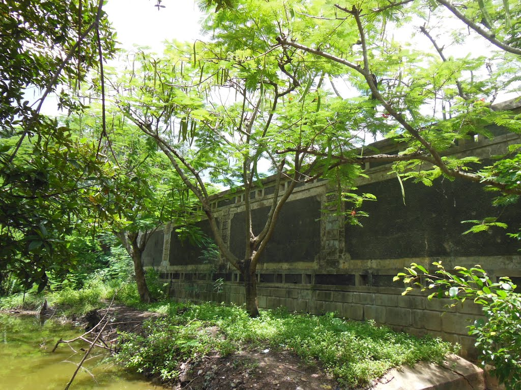 Tường ThànhVững chắc của đ ồn Rạch Cát